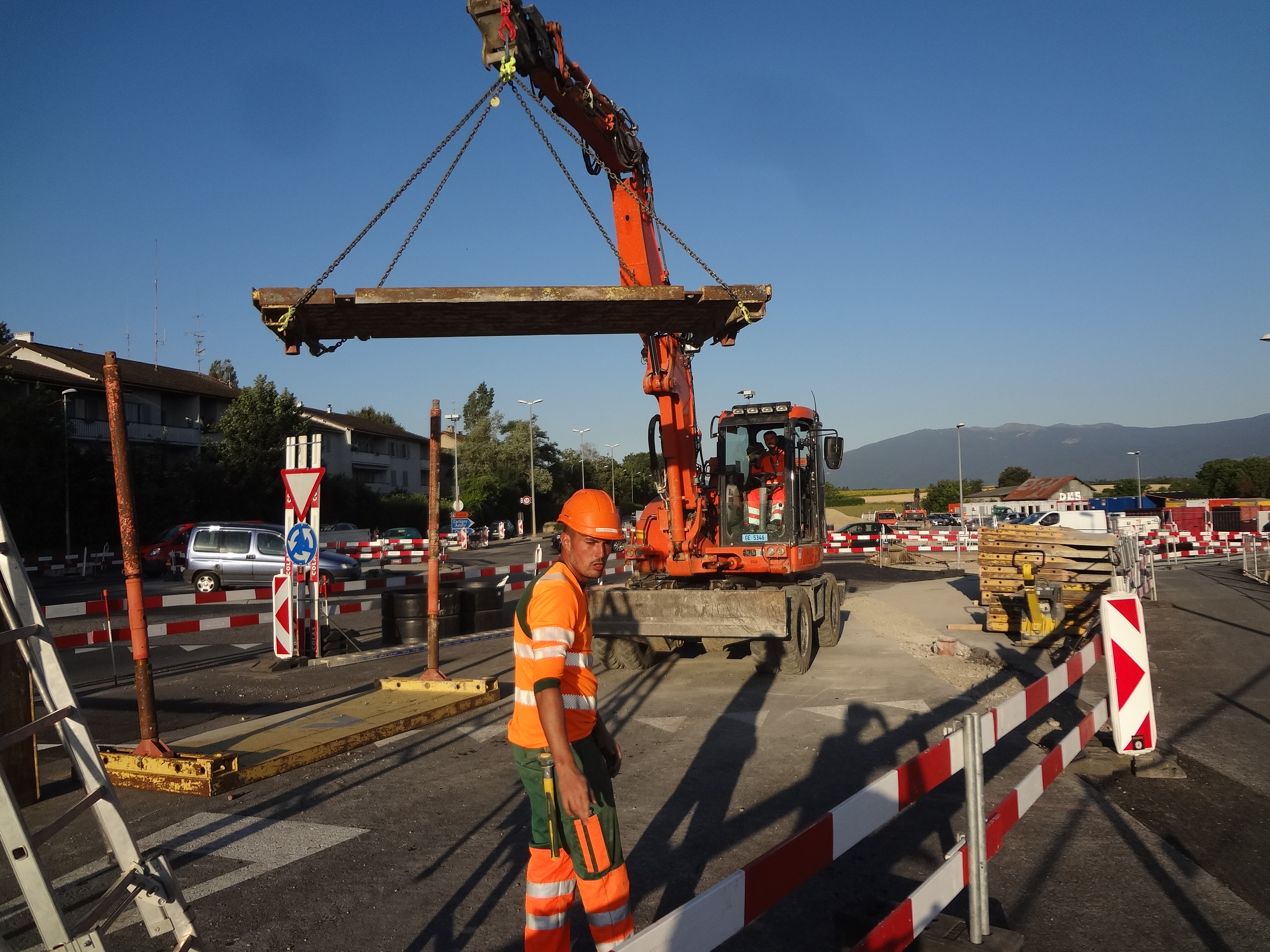 Travaux de prolongement du tram 14 à Bernex, continuation du chantier TCOB. Élargissement de la route de Chancy.